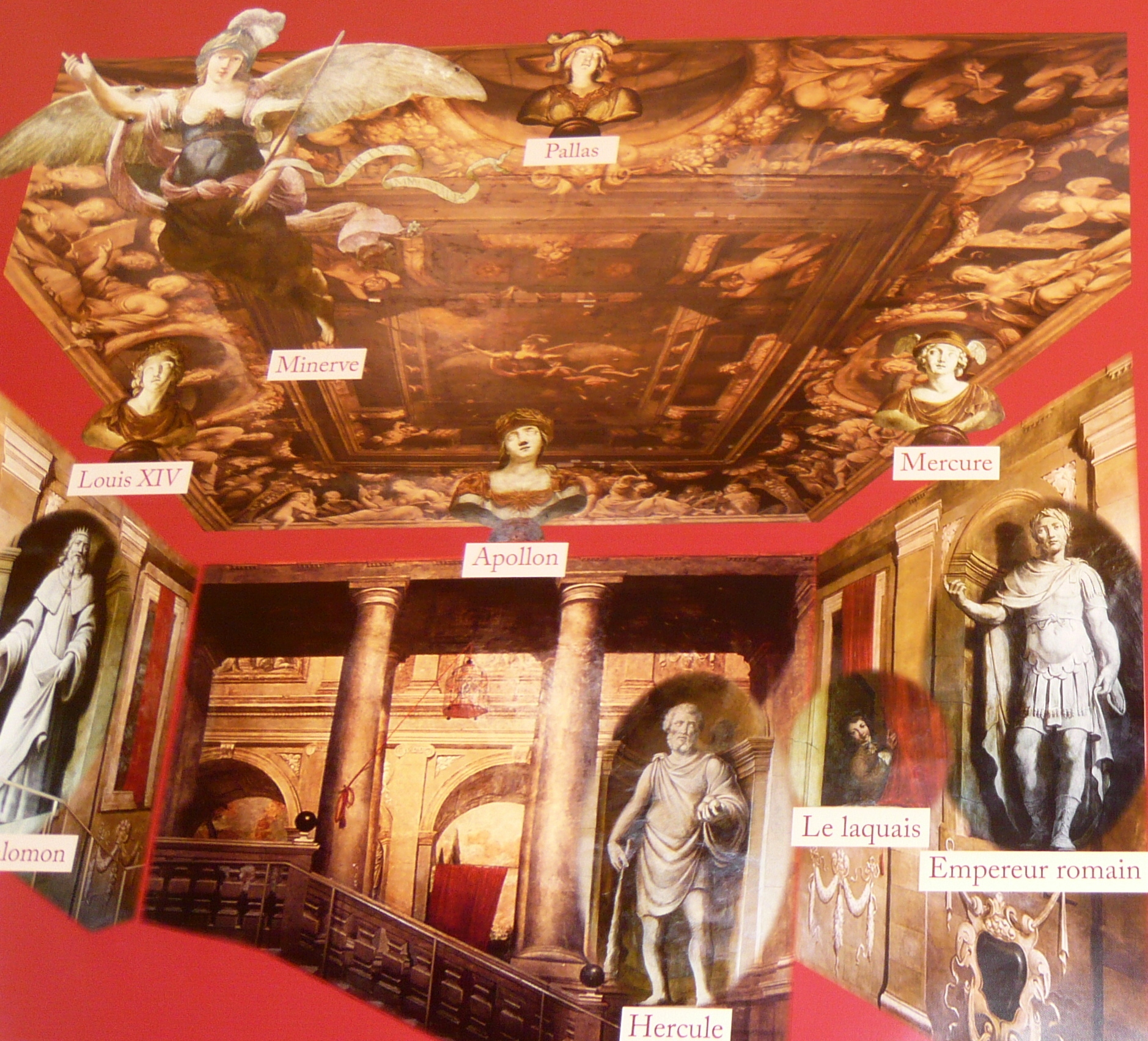 Hôtel de Châteaurenard 19 rue Gaston-de-Saporta trompe-l'oeil Jean Daret panneau d'information 2013 sur la restauration en cours.